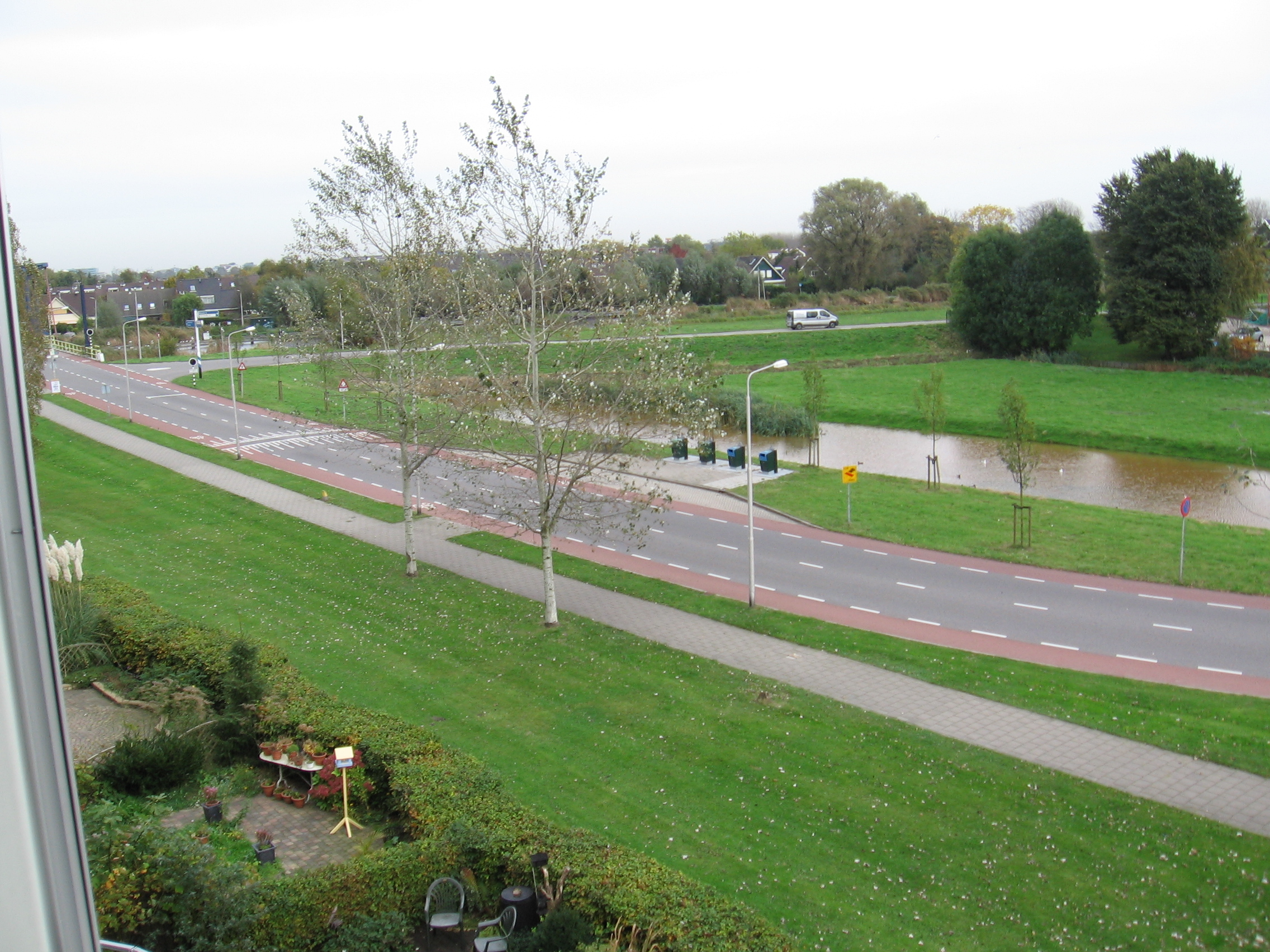 Bullewijk